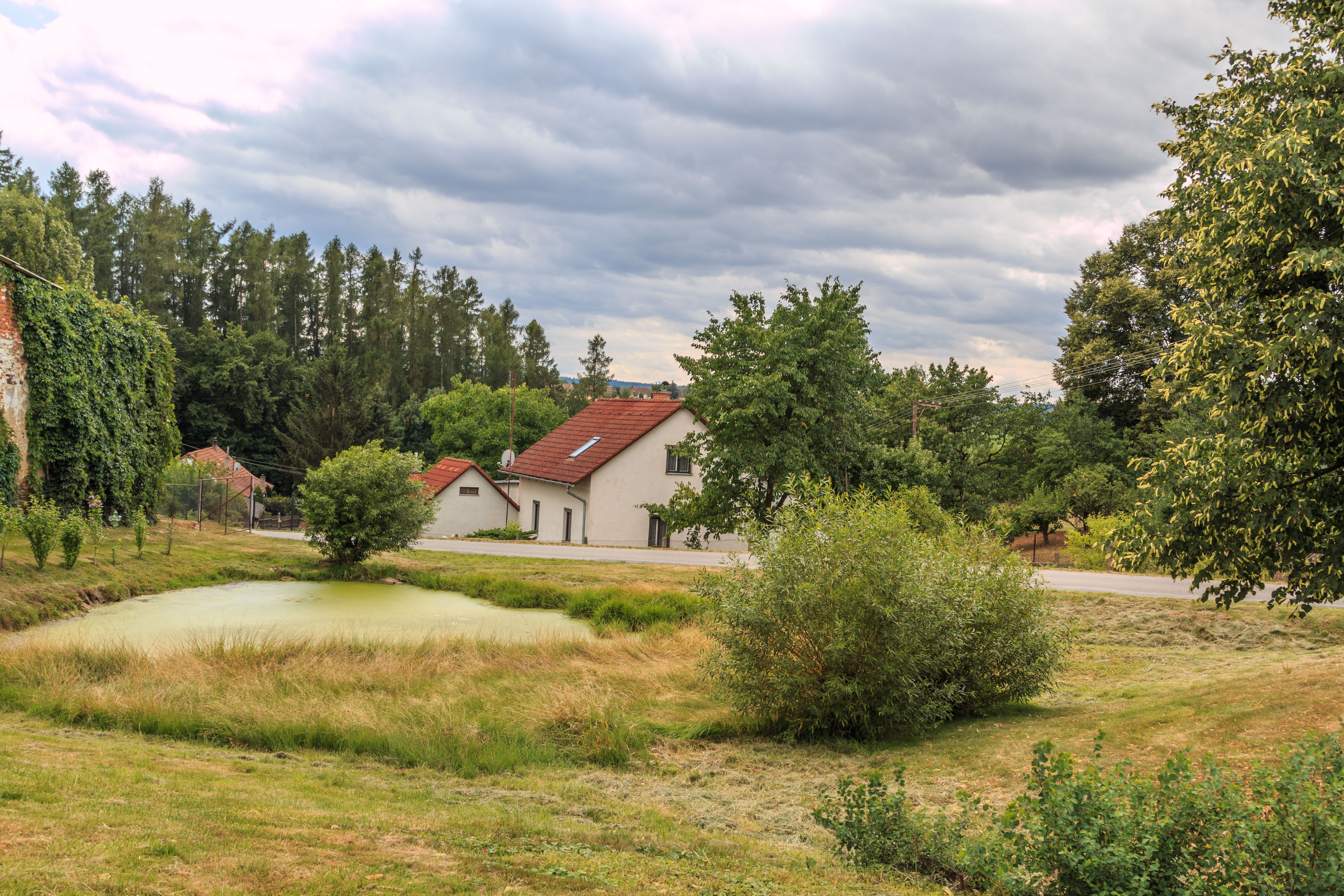 Heřmanice návesní rybníček